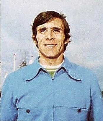 Jean-Claude Nallet en 1971 (He was wounded in 1971, and he does not participate in the 1972 Olympic games) - 'Munchen 72', Panini figurina n°86.